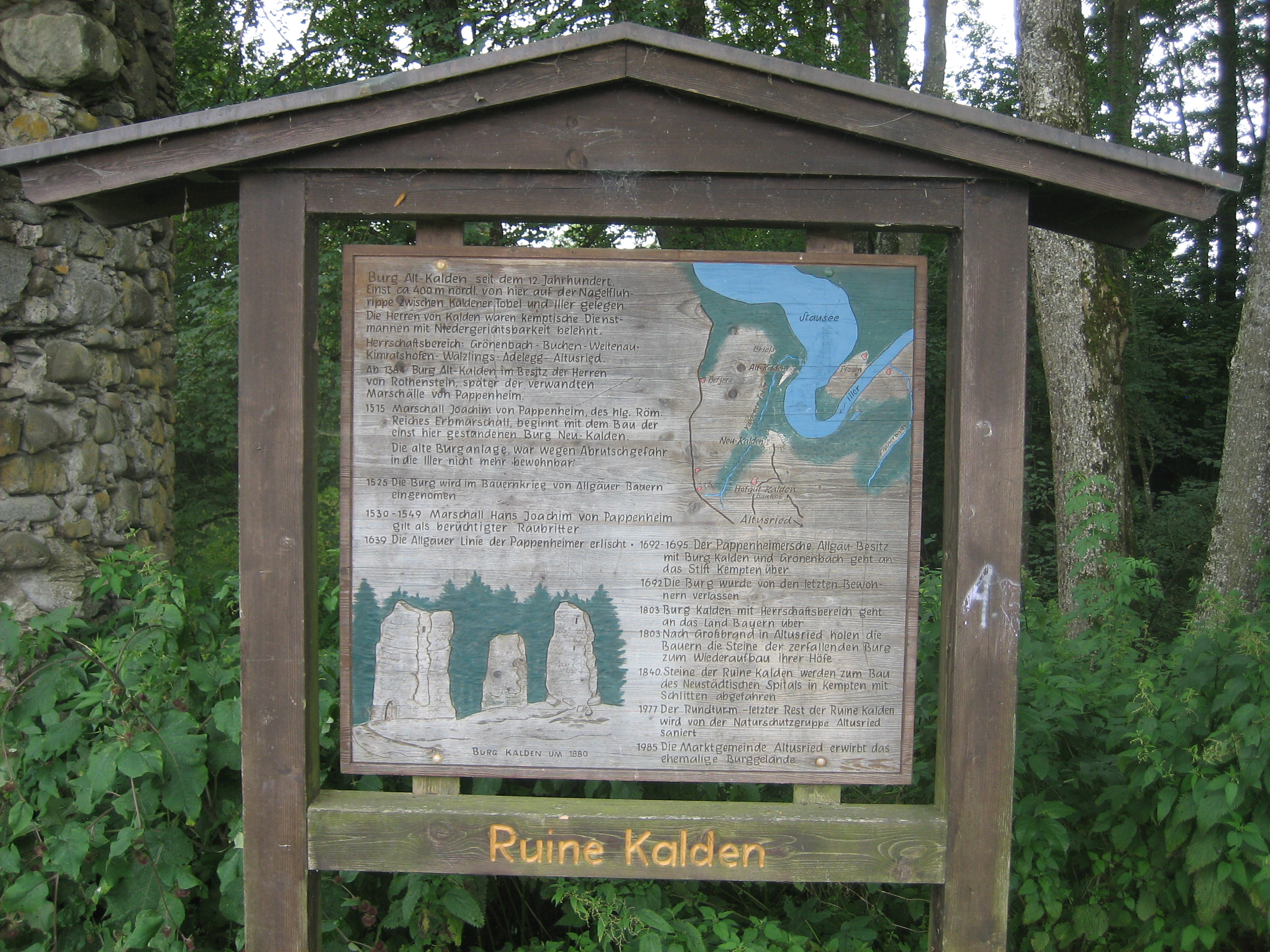 Burg Kalden, Altursried, Landkreis Unterallgäu, Bayern Erbaut 1515 Abbruch 1803/1840